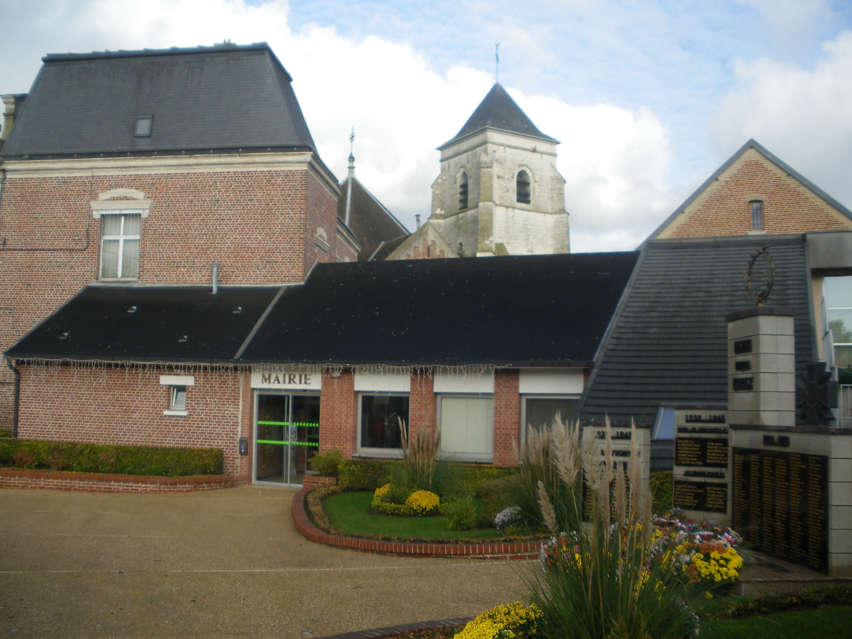 Vue du centre de Barlin : au premier plan la mairie, au second l'église, à droite le monument aux morts.